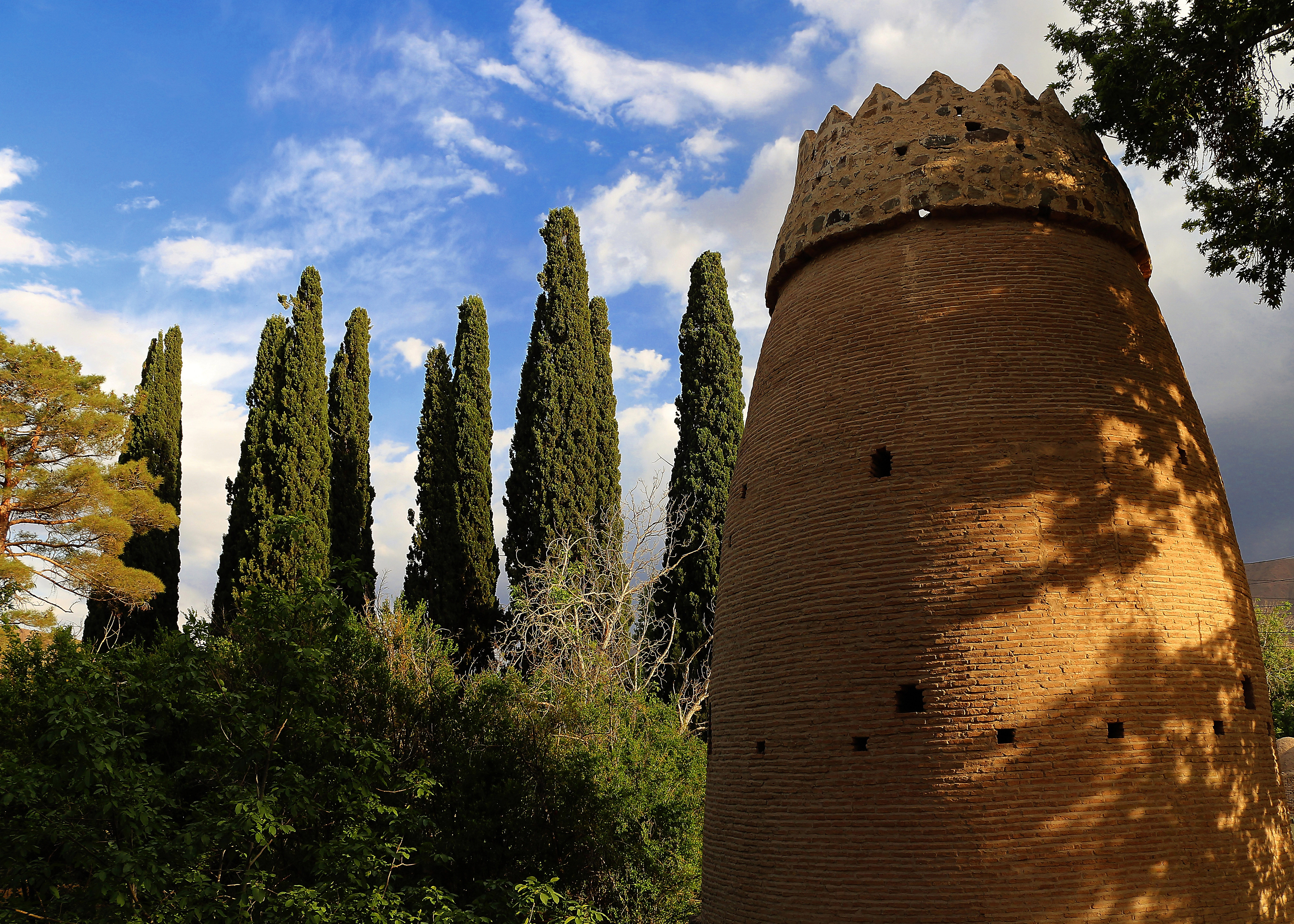 برج مدور و درختان سرو باغ وکیلی-روستای طرز-راور کرمان